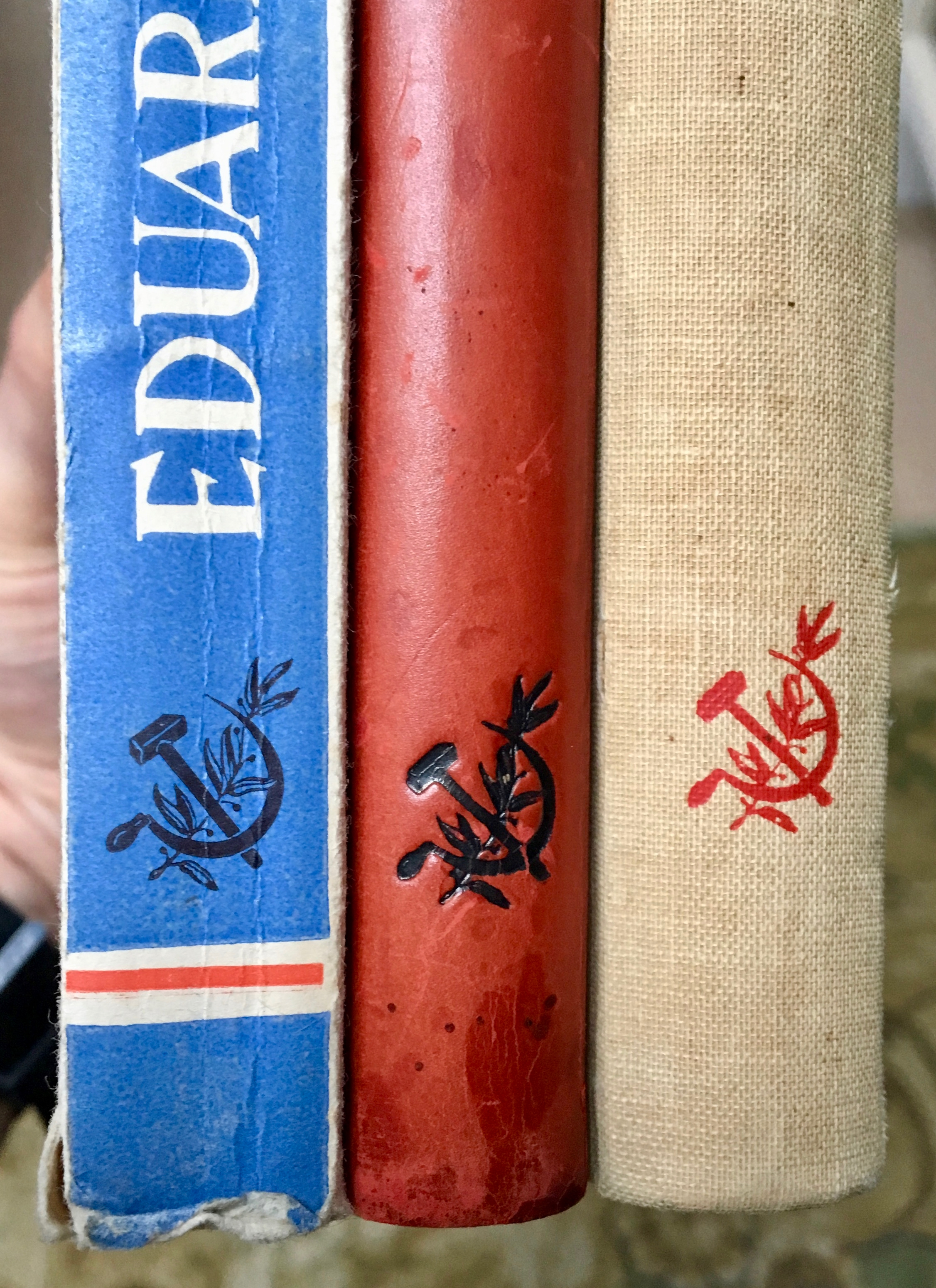 IK embleem seljal